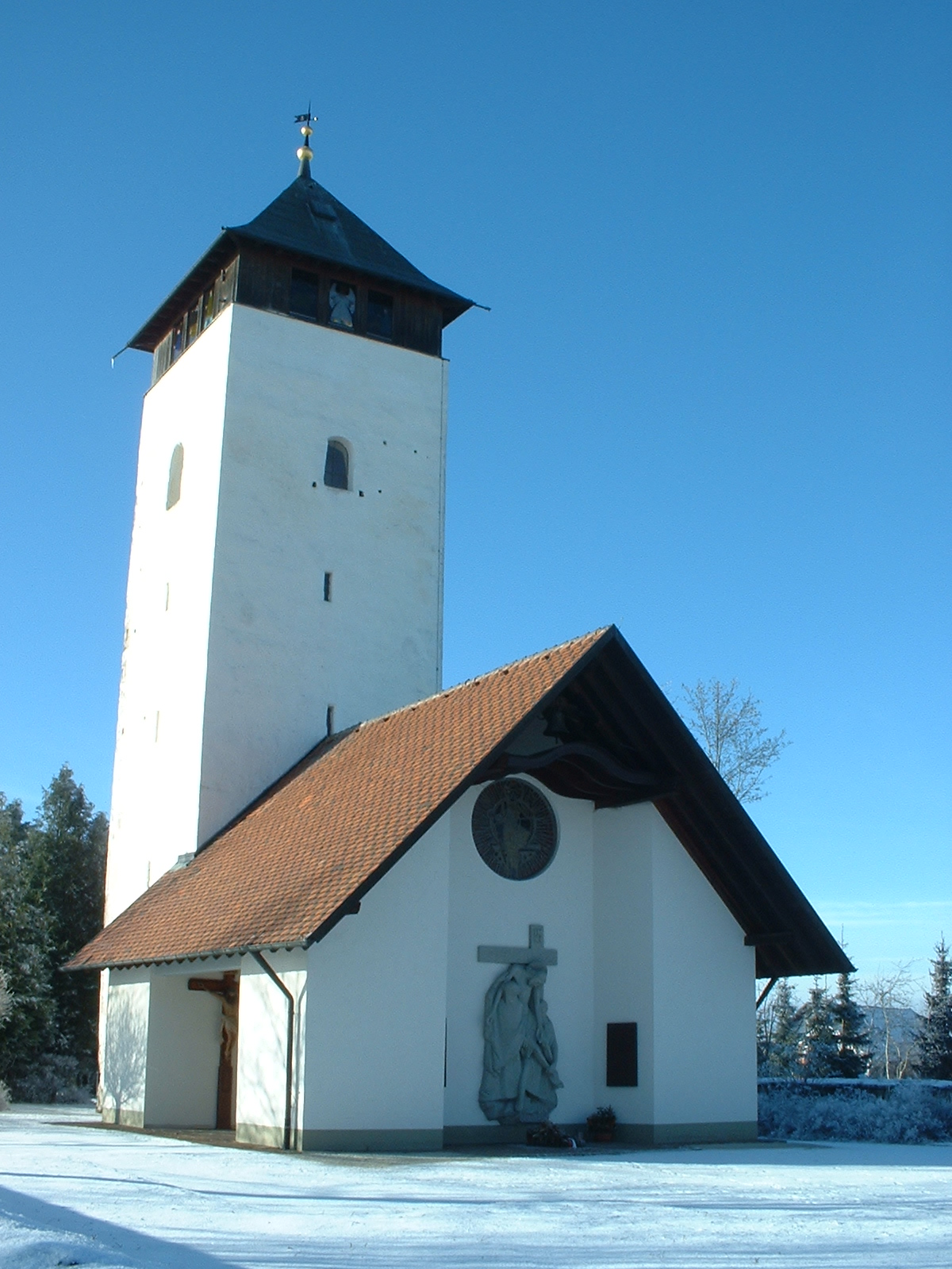 Ehemaliger Kirchturm und Aussichtsturm Buchheimer Hans in der Gemeinde Buchheim, Baden-Württemberg, Deutschland